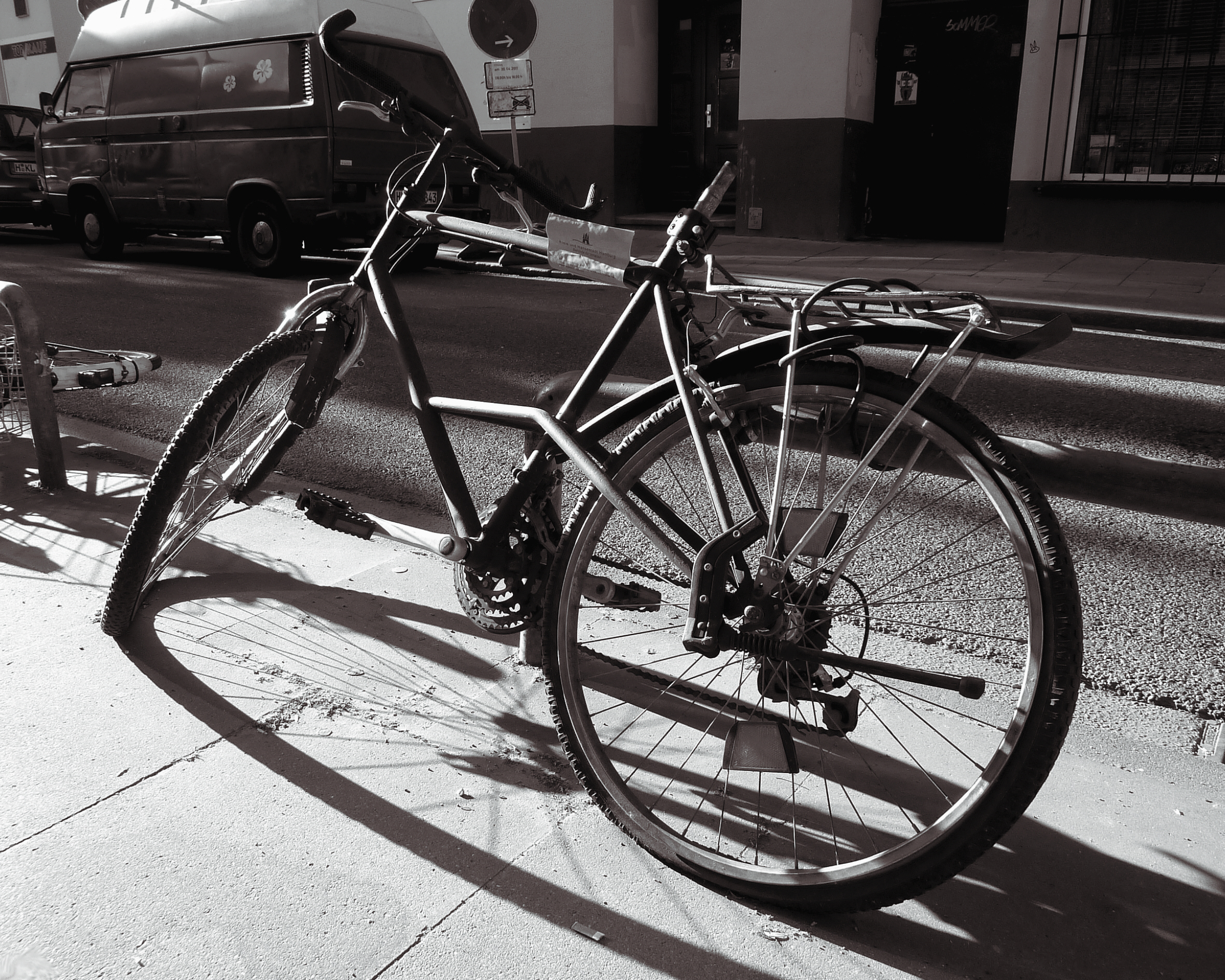 Beschädigtes schwarzes Fahrrad geparkt in Hamburg, versehen mit einem Strafmandat.